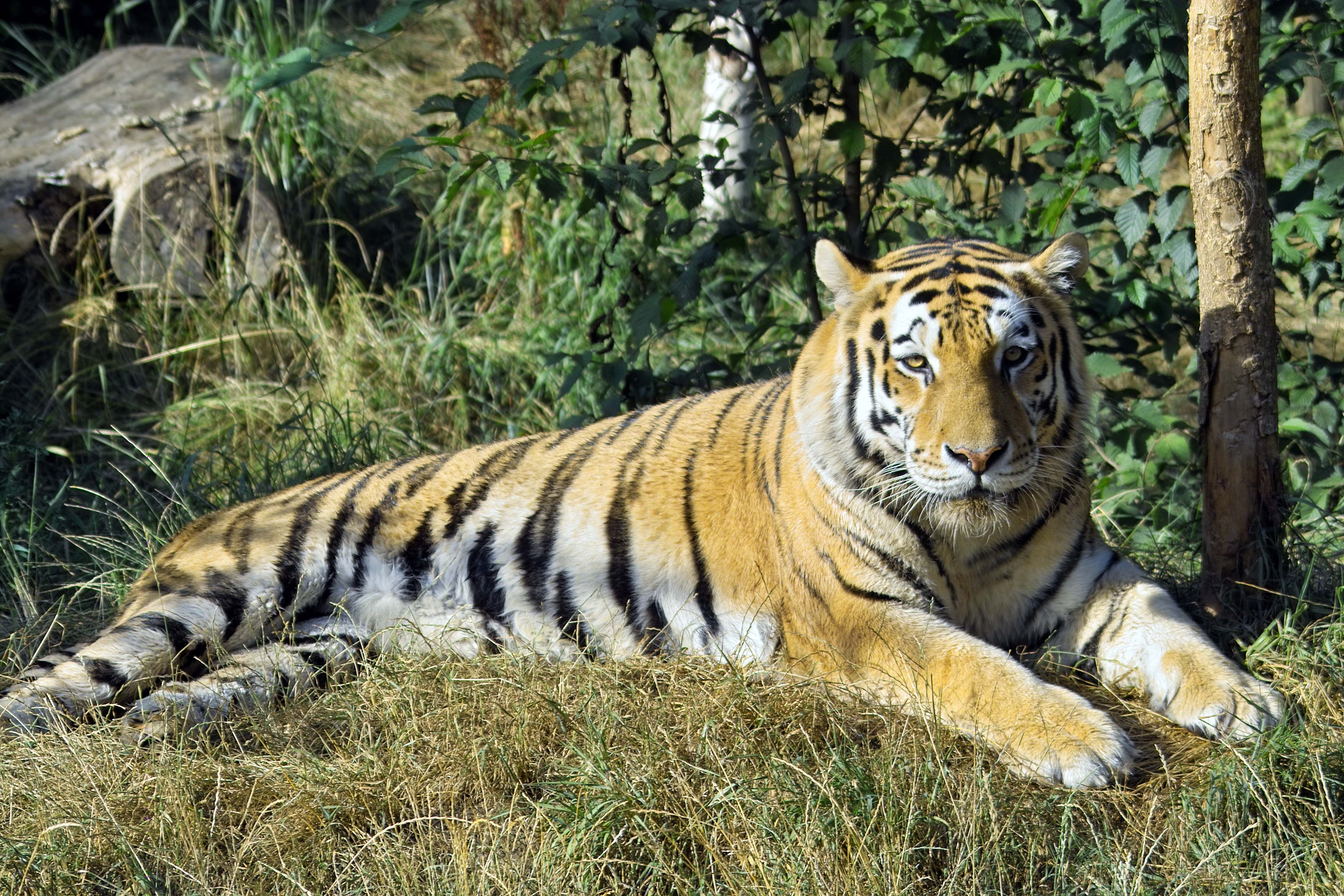 Männlicher Amurtiger (Panthera tigris altaica)